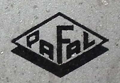 Licznik PAFAL-u z 1962r.